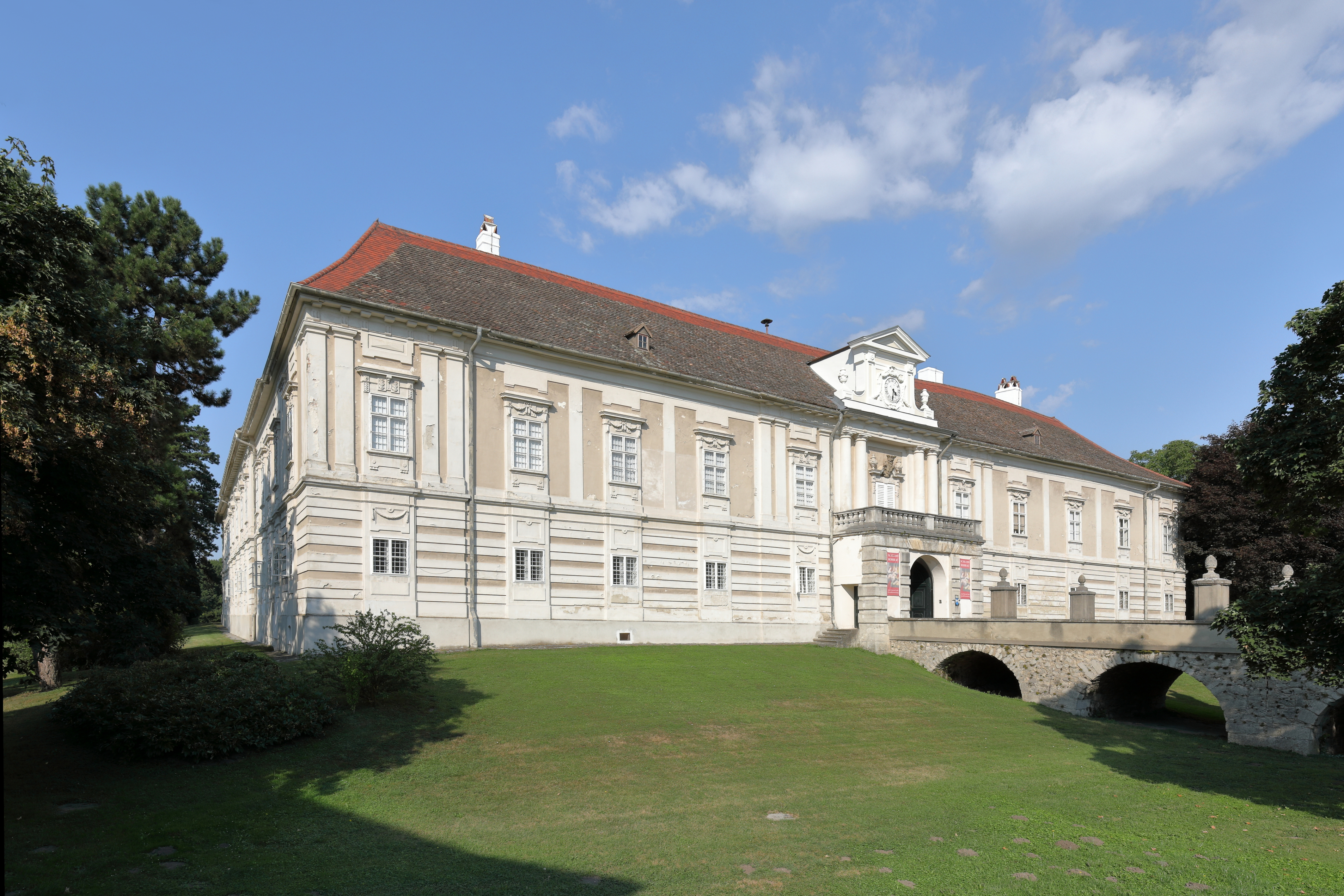 Ostansicht des Schlosses Harrach in der niederösterreichische Marktgemeinde Rohrau.Das Schloss ist seit 1542 im Besitz der Grafen Harrach. Im 16. Jahrhundert erfolgte der Ausbau der mittelalterlichen Grenzburg zu einem Wasserschloss. Umbauten erfolgten 1688 sowie 1722 und 1776/77 erhielt das vierflügelige Schloss im Wesentlichen sein heutiges Erscheinungsbild.